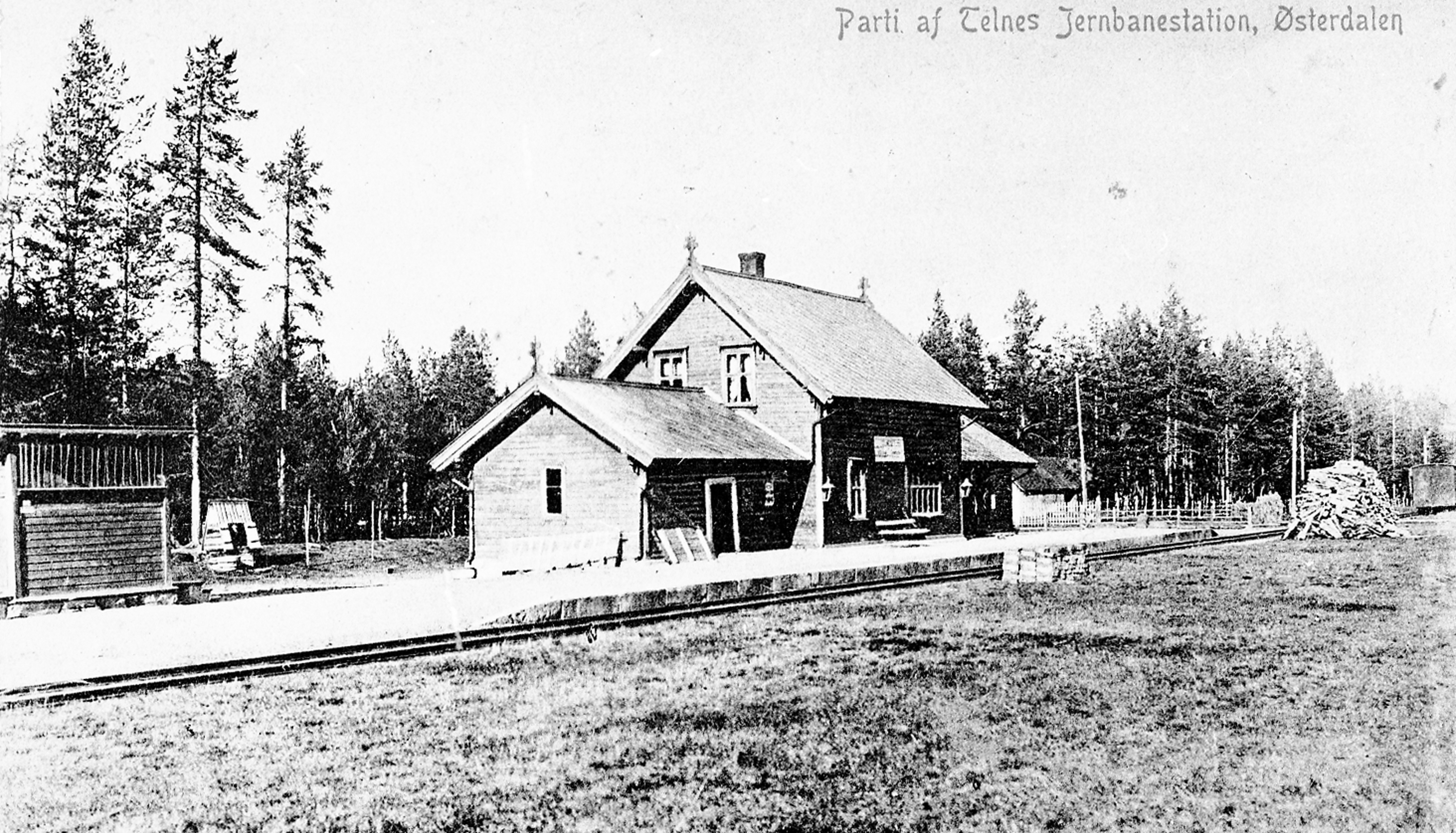 Telneset stasjon på Rørosbanen, ca. 1915. Fra samlingen til Musea i Nord-Østerdalen i Digitalt museum.